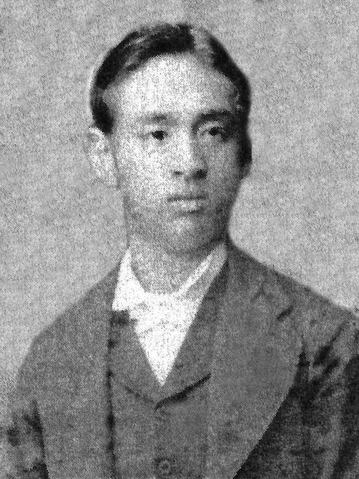 ja: 織田信敏 en: Oda Nobutoshi (1853–1901)